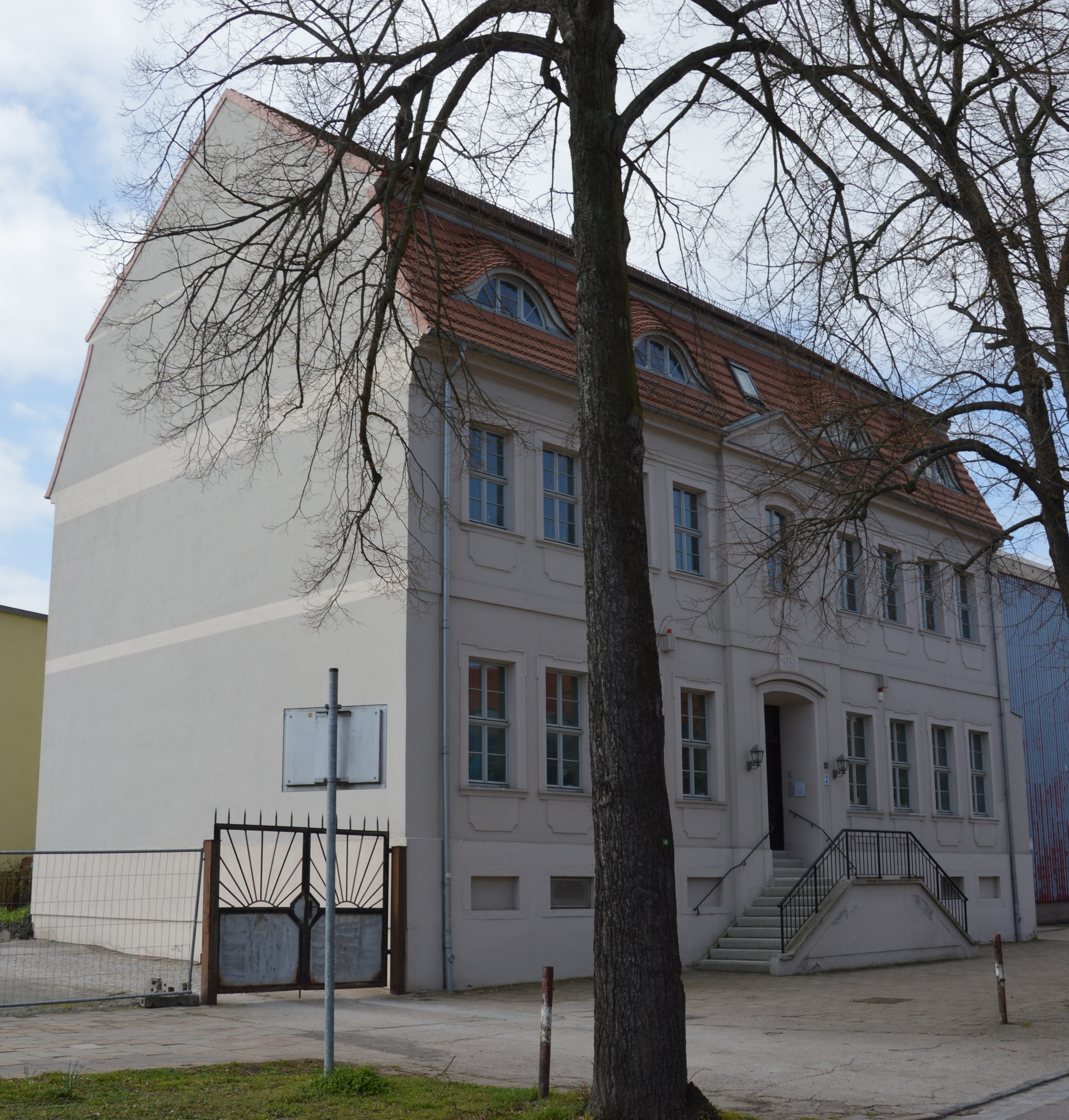 Haus Breite Straße 12 in Schönebeck